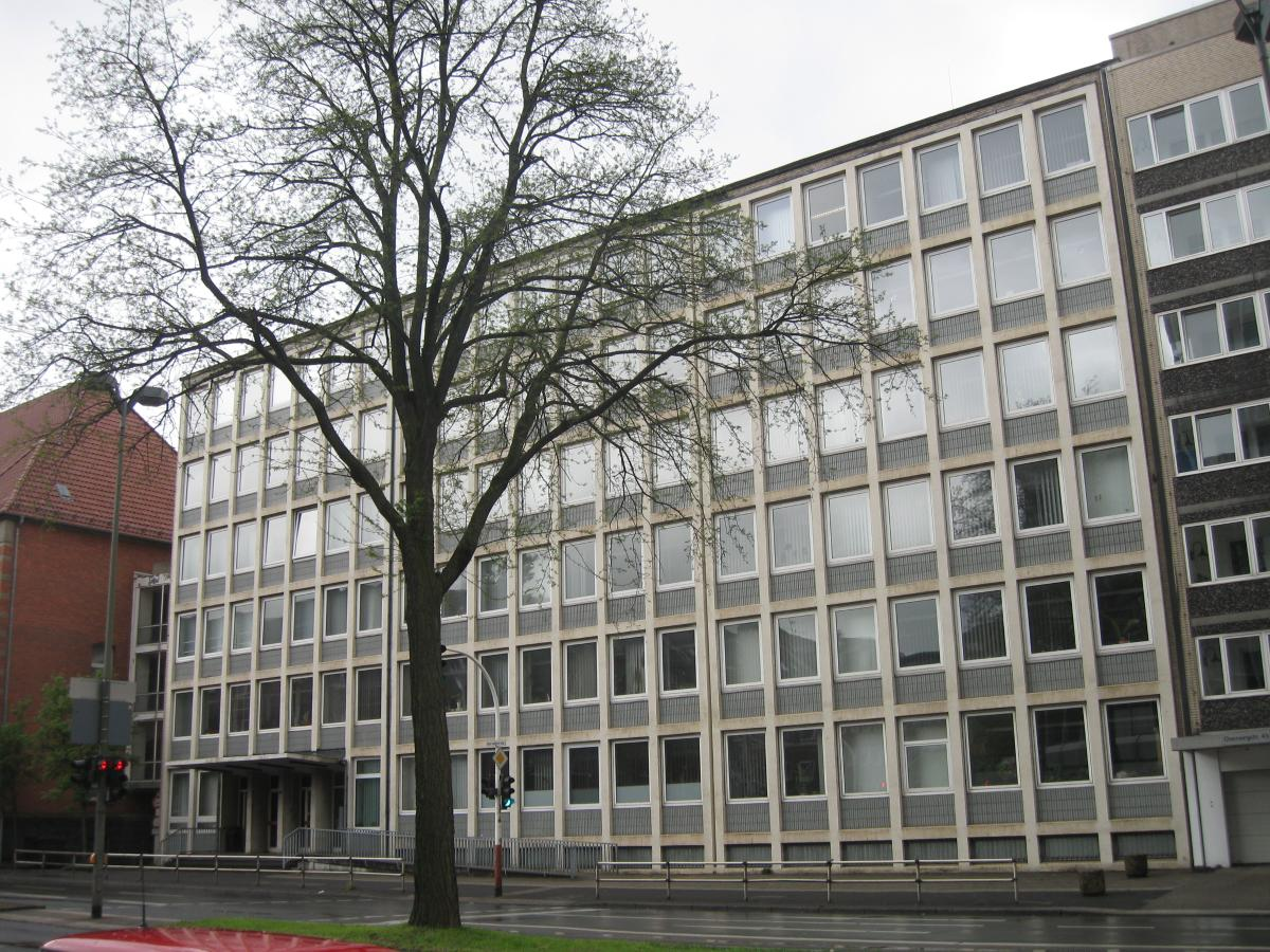 Früherer Sitz des Amtsgerichts Gelsenkirchen an der Overwegstraße 35, Neubau. Es handelt sich um einen 1958 errichteten Anbau an das im Jahr 1900 in Betrieb genommene alte Hauptgebäude. Links zu erkennen sind der Haupteingang des Gerichts und die Brücke zum Altbau (in dem sich bis zuletzt die Mehrzahl der Sitzungssäle befand); das unten eingebundene Bild schließt hier an. Der Komplex wurde nach der Verlegung des Amtsgerichts in das im Januar 2016 bezogene neue Gelsenkirchener Justizzentrum am Wissenschaftspark aufgegeben.